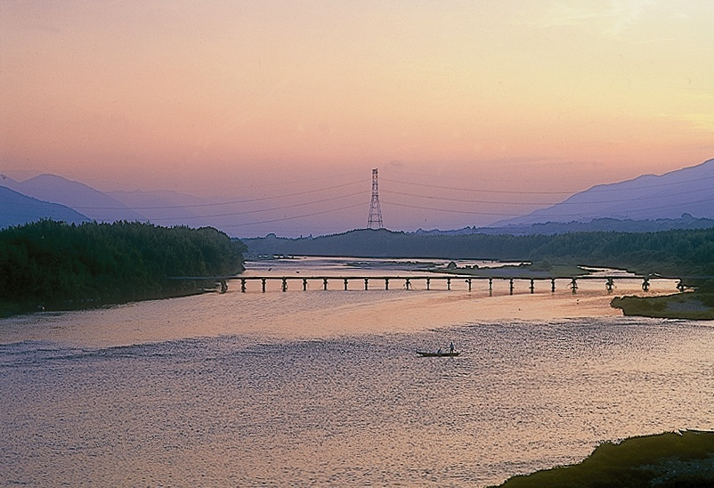 River de Yoshino (Mima) in de avond